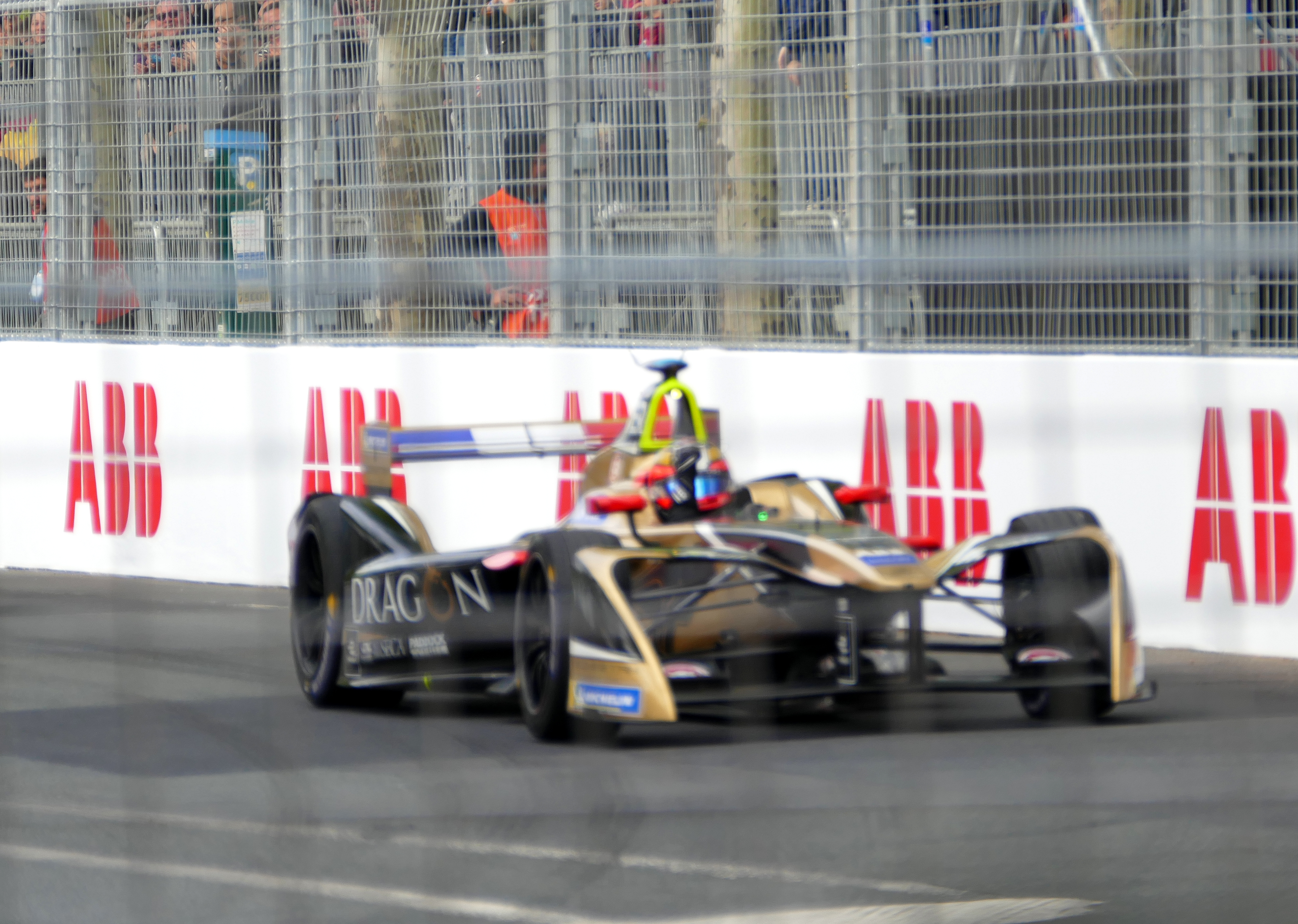 Le français Jean-Éric Vergne remporte la course sur Techeetah lors du ePrix de Paris 2018